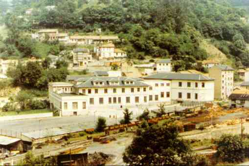 Antiguo Colegio La Salle de Turón, Asturias, España (Mártires de Turón)